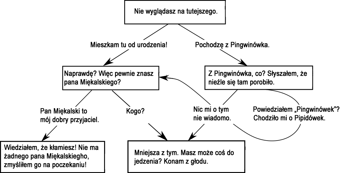 Schemat rozmowy na drzewku dialogowym. Tłumaczenie pracy autorstwa użytkownika Dcoetzee.